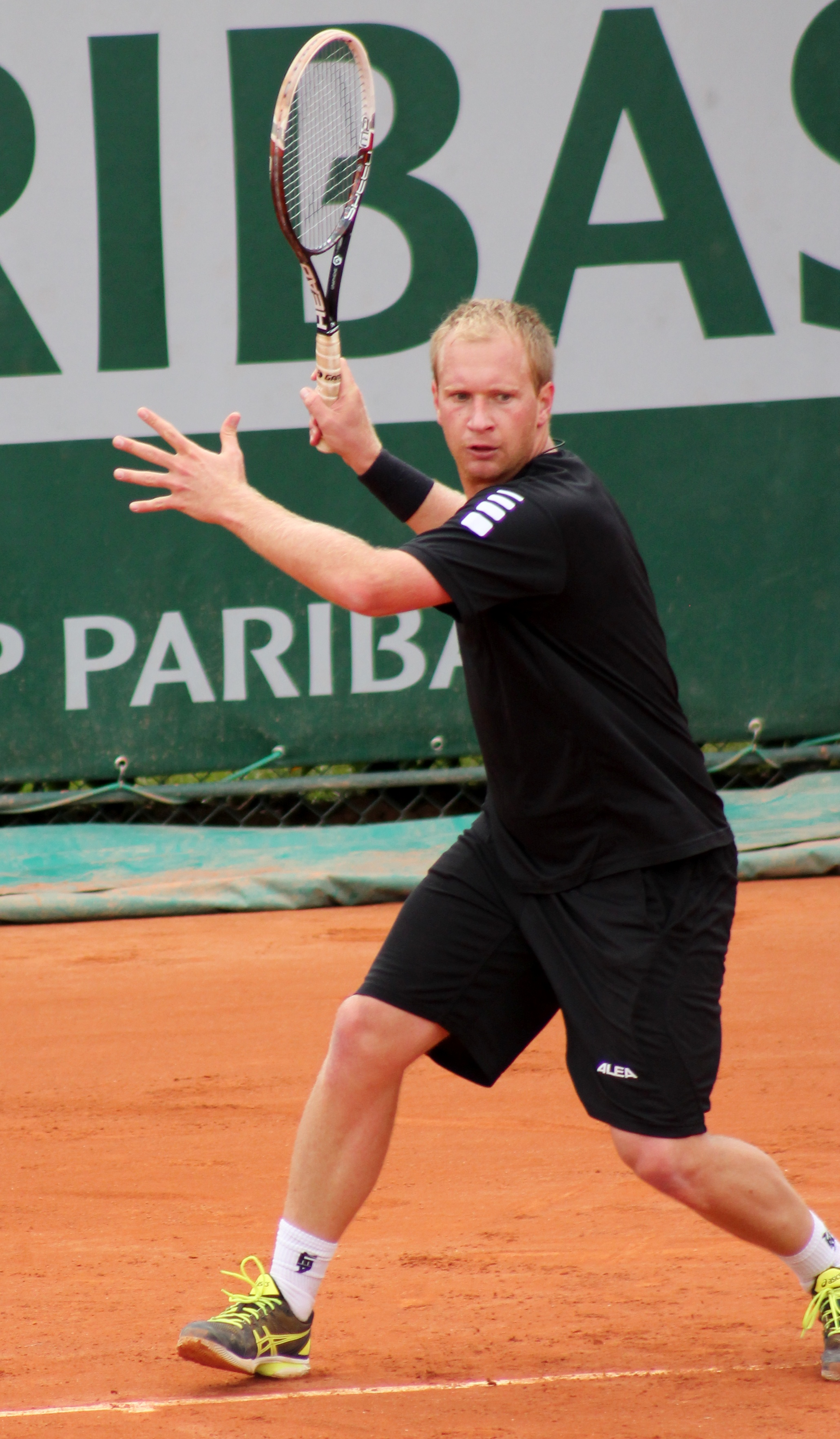 Lukáš Dlouhý